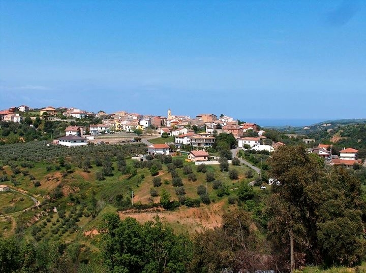 Santa Sofia d'Epiro